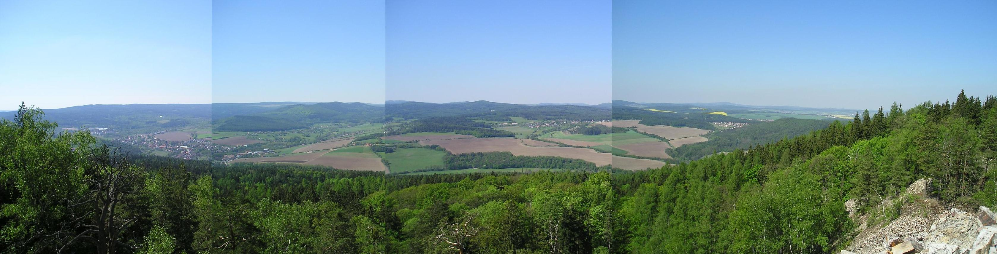 Vyhlídka z Plešivce